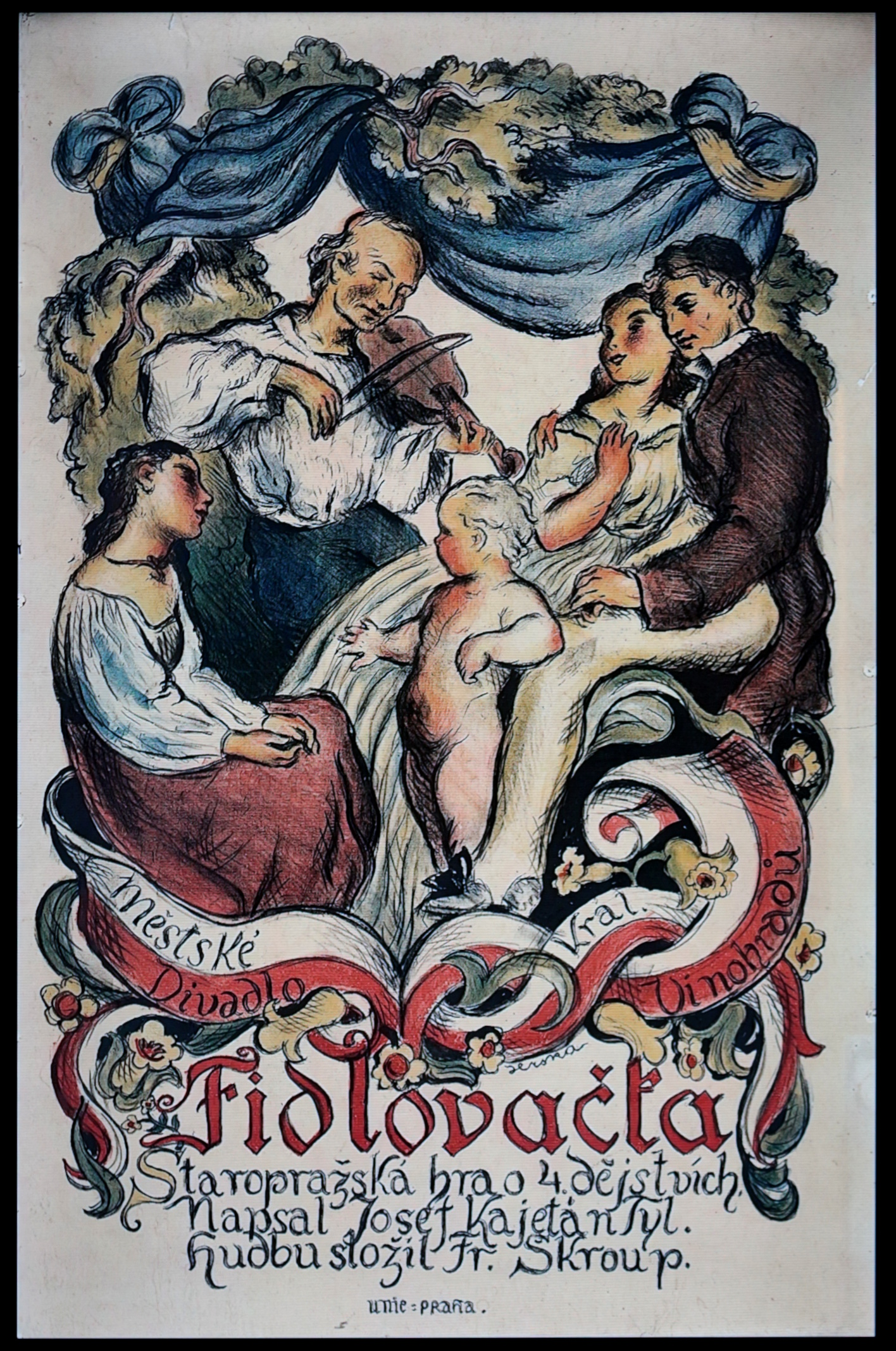 Alexandr Vladimír Hrska, J. K. Tyl, F. Škroup – Fidlovačka, 1917 Vinohradské divadlo Praha